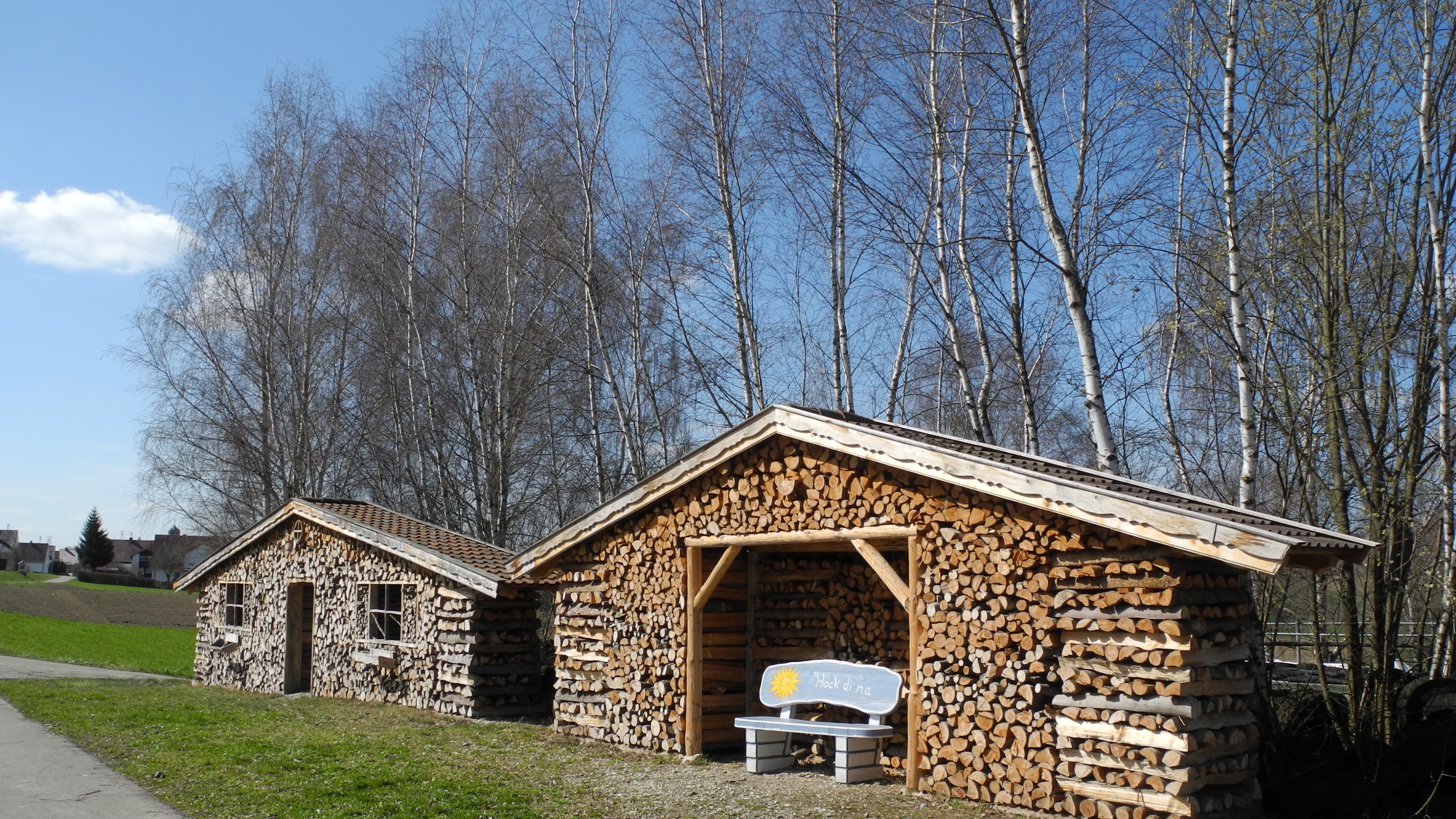 Zusmarshausen-Holzhütte mit Sitzbank, Einladung Hock di na